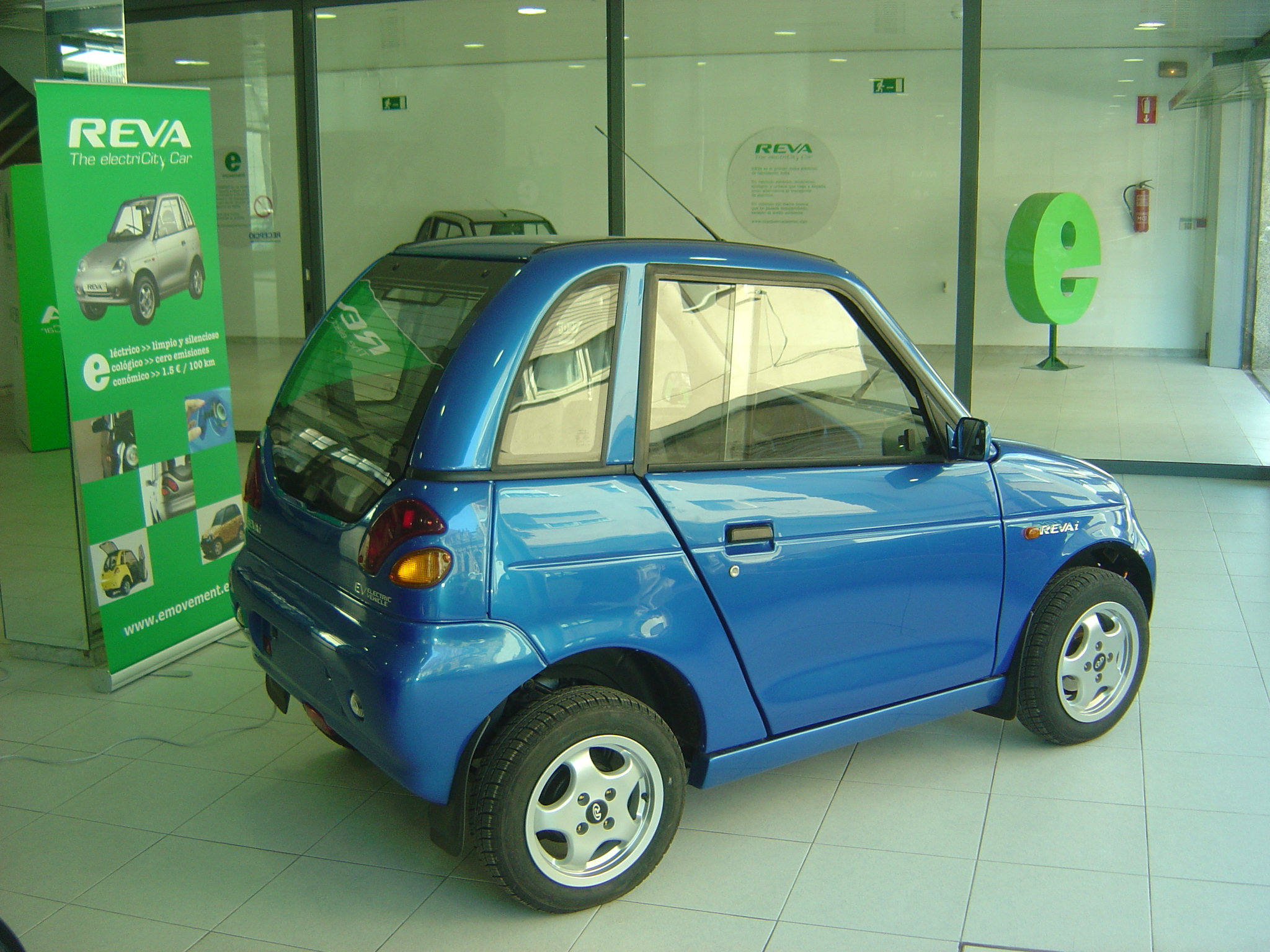 REVA i en concesionario Emovement (Sabadell)